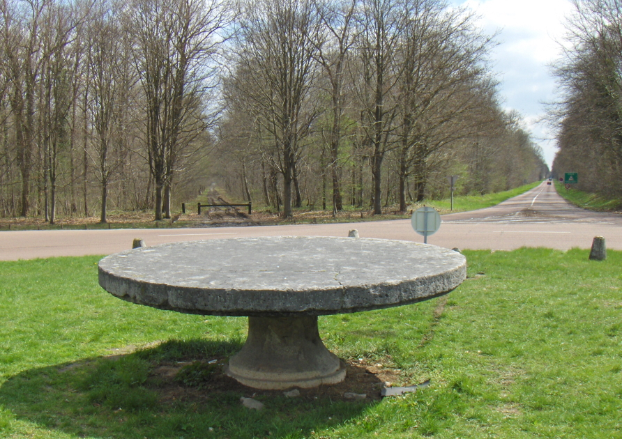 La table au carrefour du même nom sur la route entre Chantilly et Montgrésin